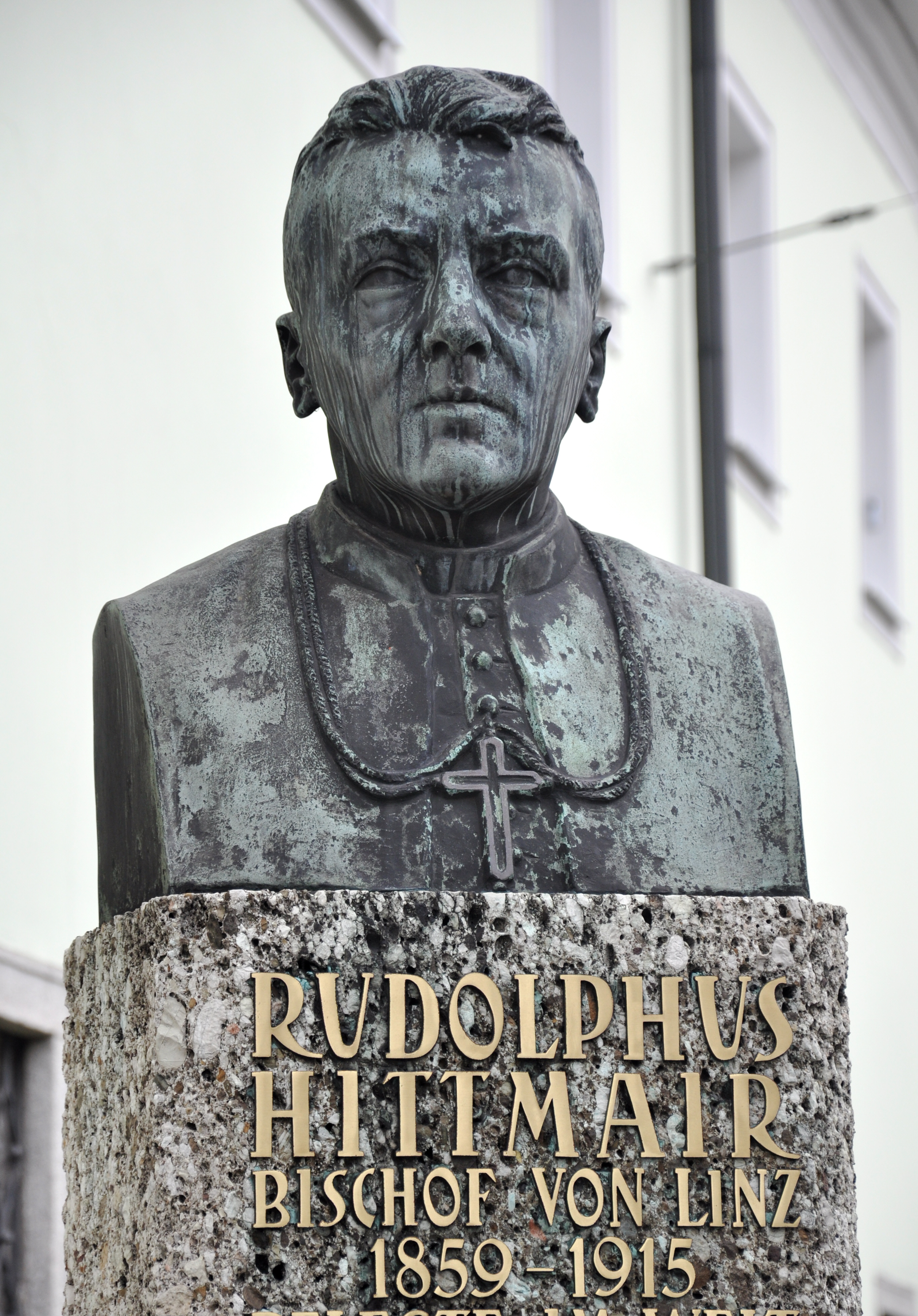 Linz, Denkmal für Bischof Rudolph Hittmair vor der Kirche der Barmherzigen Brüder, Detail: Büste